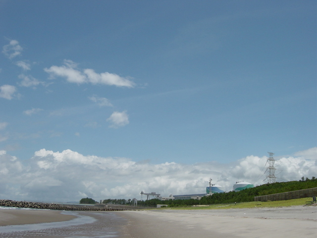 川内原子力発電所 Licensing Category:日本の原子力発電所